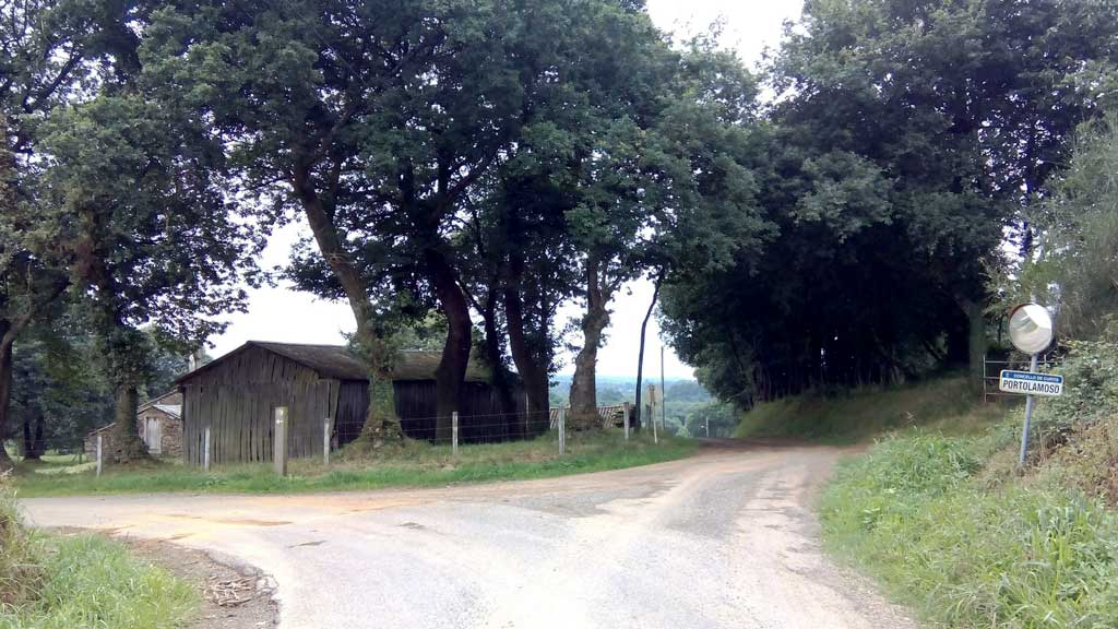 Vista de Portolamoso, Curtis.